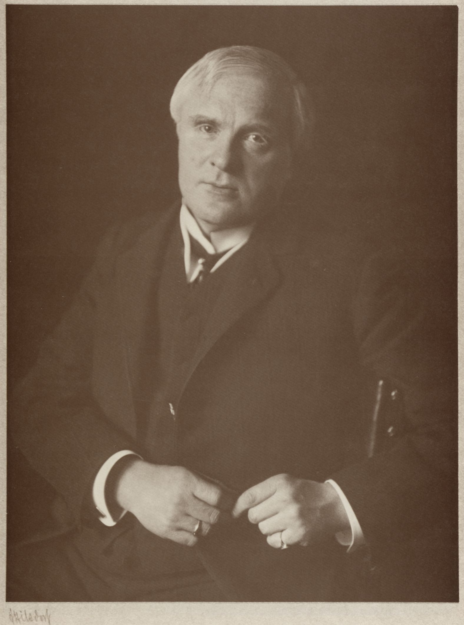 Portrait of Bjørn Bjørnson